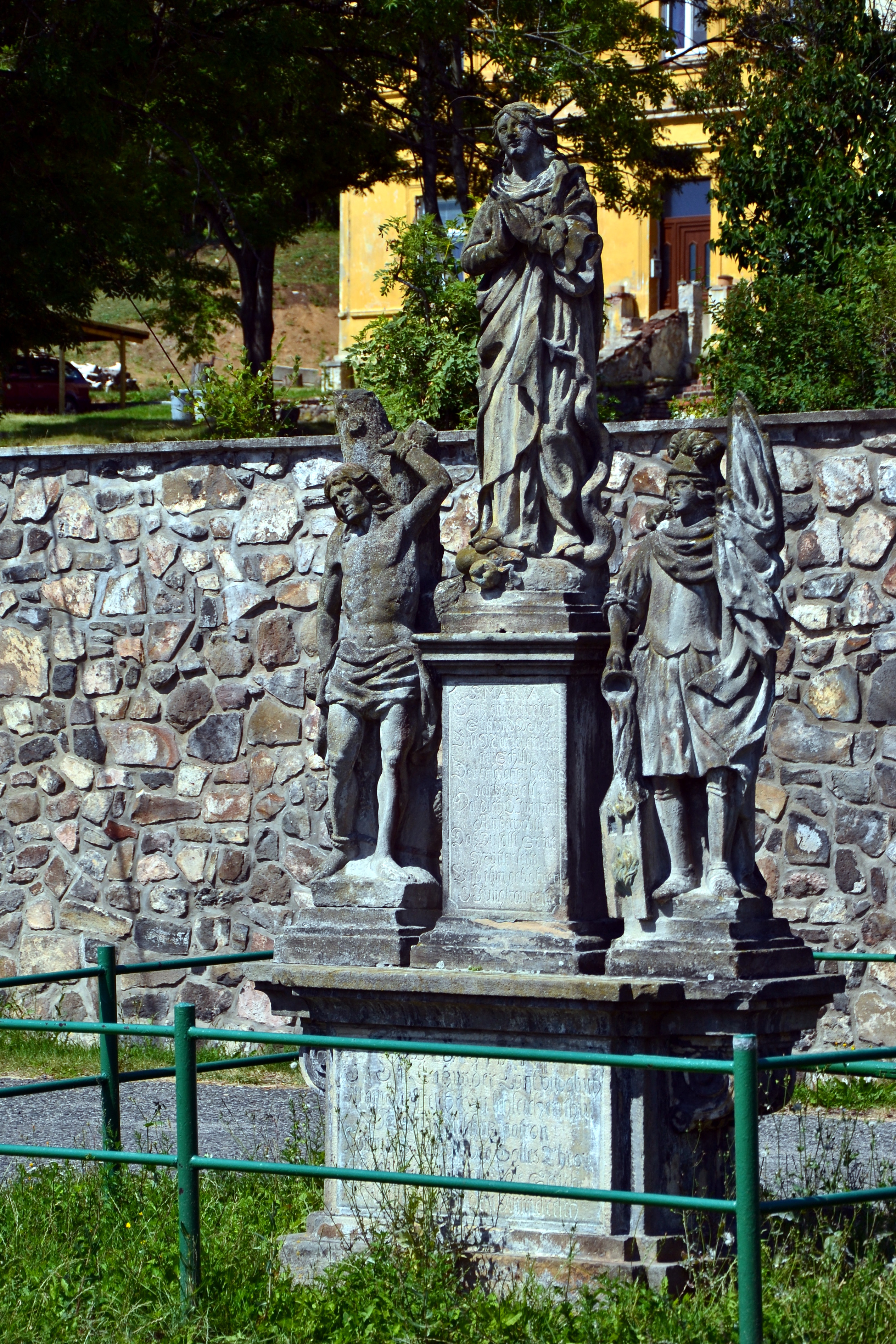 Sousoší P. Marie Immaculaty (Úhošťany), Úhošťany